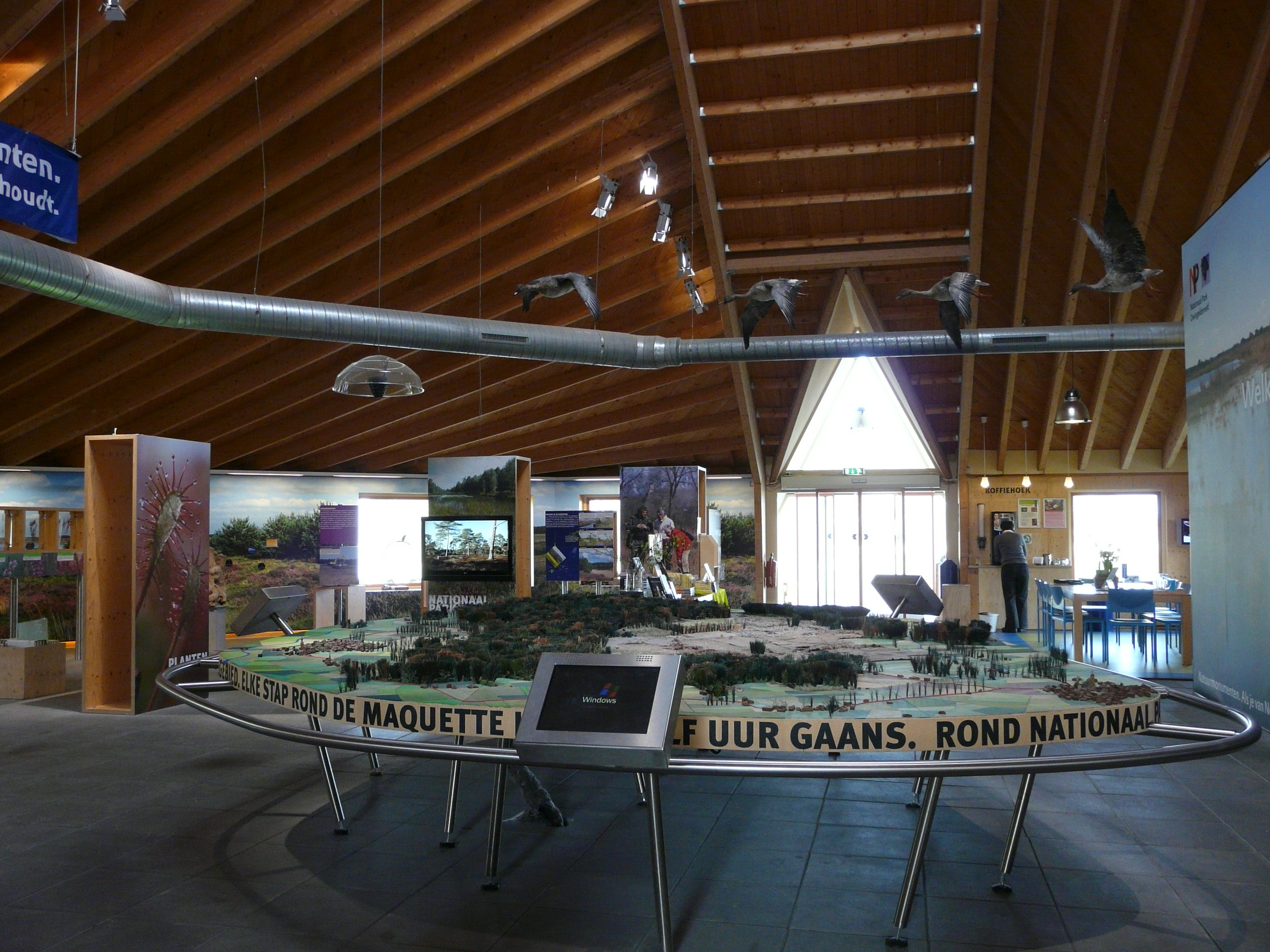 Zicht op een deel van het interieur van het Bezoekerscentrum Dwingelderveld van Natuurmonumenten in Benderse bij Ruinen